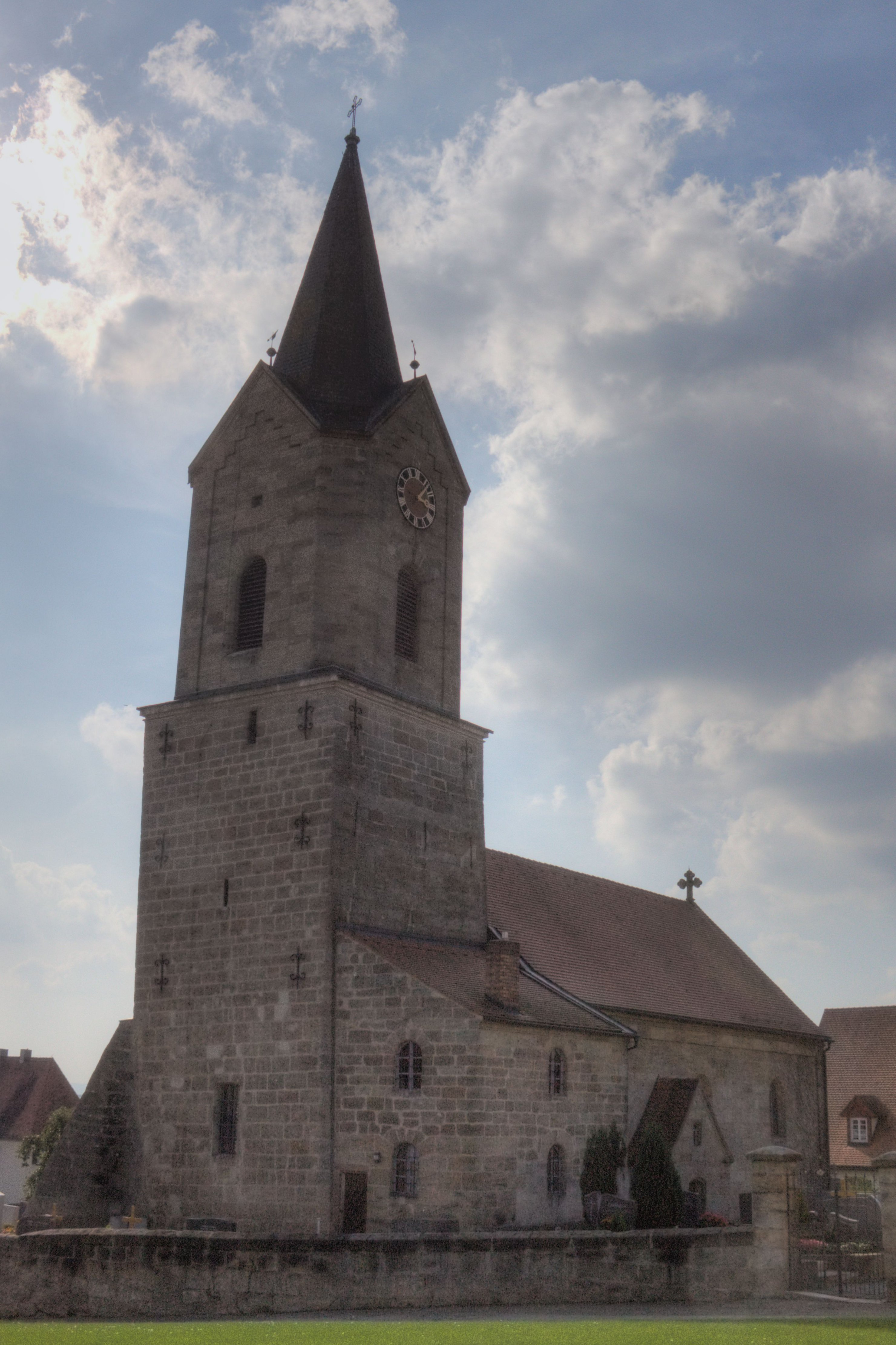 Pfarrkirche Mariä Himmelfahrt, nordöstliche Ansicht